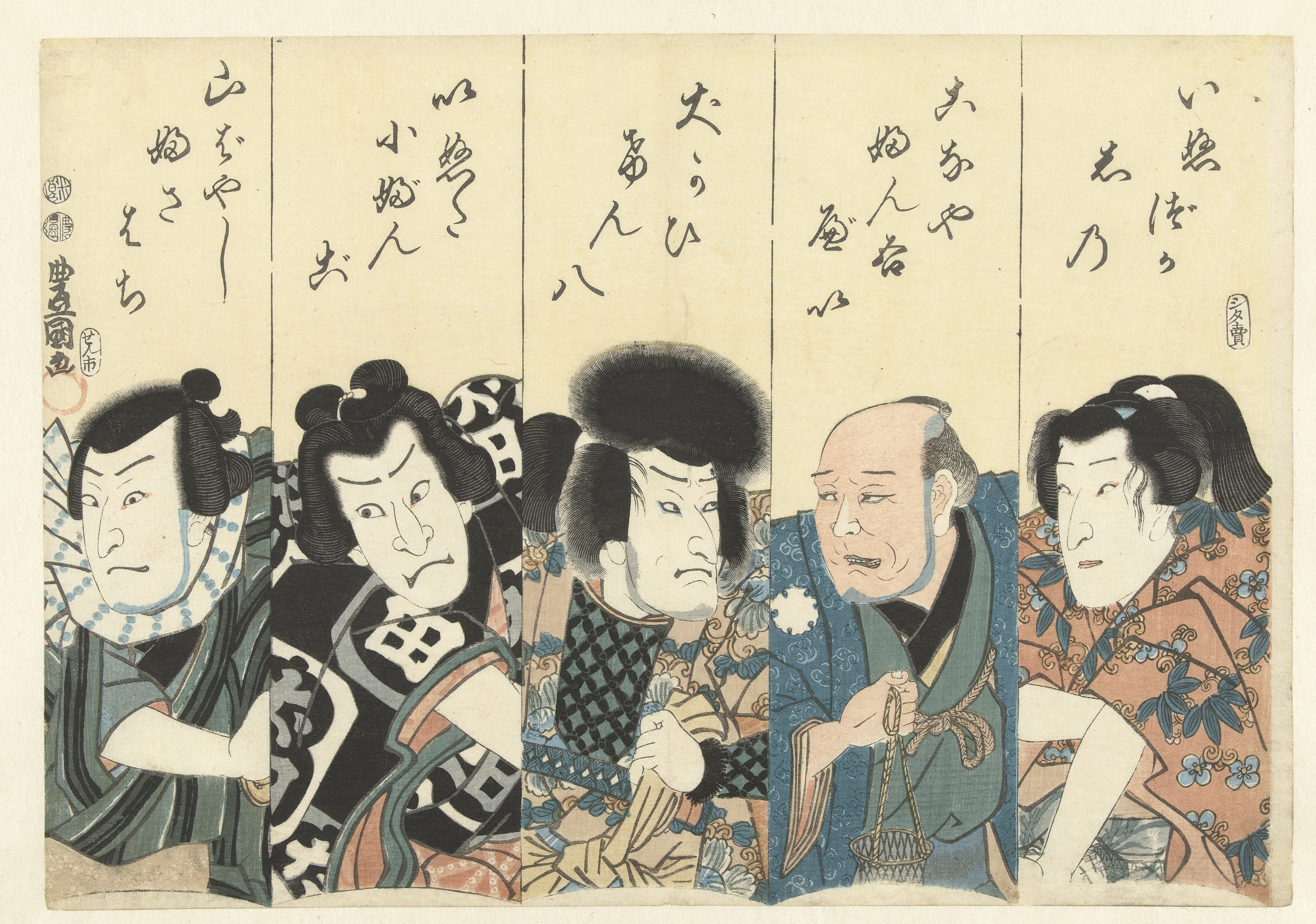 Vijf acteurs uit het toneelstuk Satomi hakkenden; naast elkaar ten halven lijve afgebeeld. vlnr Sawamura Chojuro V in de rol van Yamabayashi Fusahachi, Arashi Kichisaburo III als Inuda Kobungo, Seki Sanjuro III als Inugai Kempachi, Otani Tomoemon III als Konaya Fungobei en Bando Shuka als Inuzuka Shino. Label Line: mentioned on object Kunisada (I) , Utagawa (1786 - 1865), 1851 - 1853, kleurenhoutsnede; lijnblok met kleurblokken Collection: prenten; Japan (collectie)